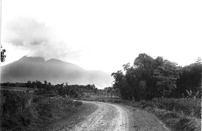 Foto. Landschap met gezicht op de Goenoeng Malabar